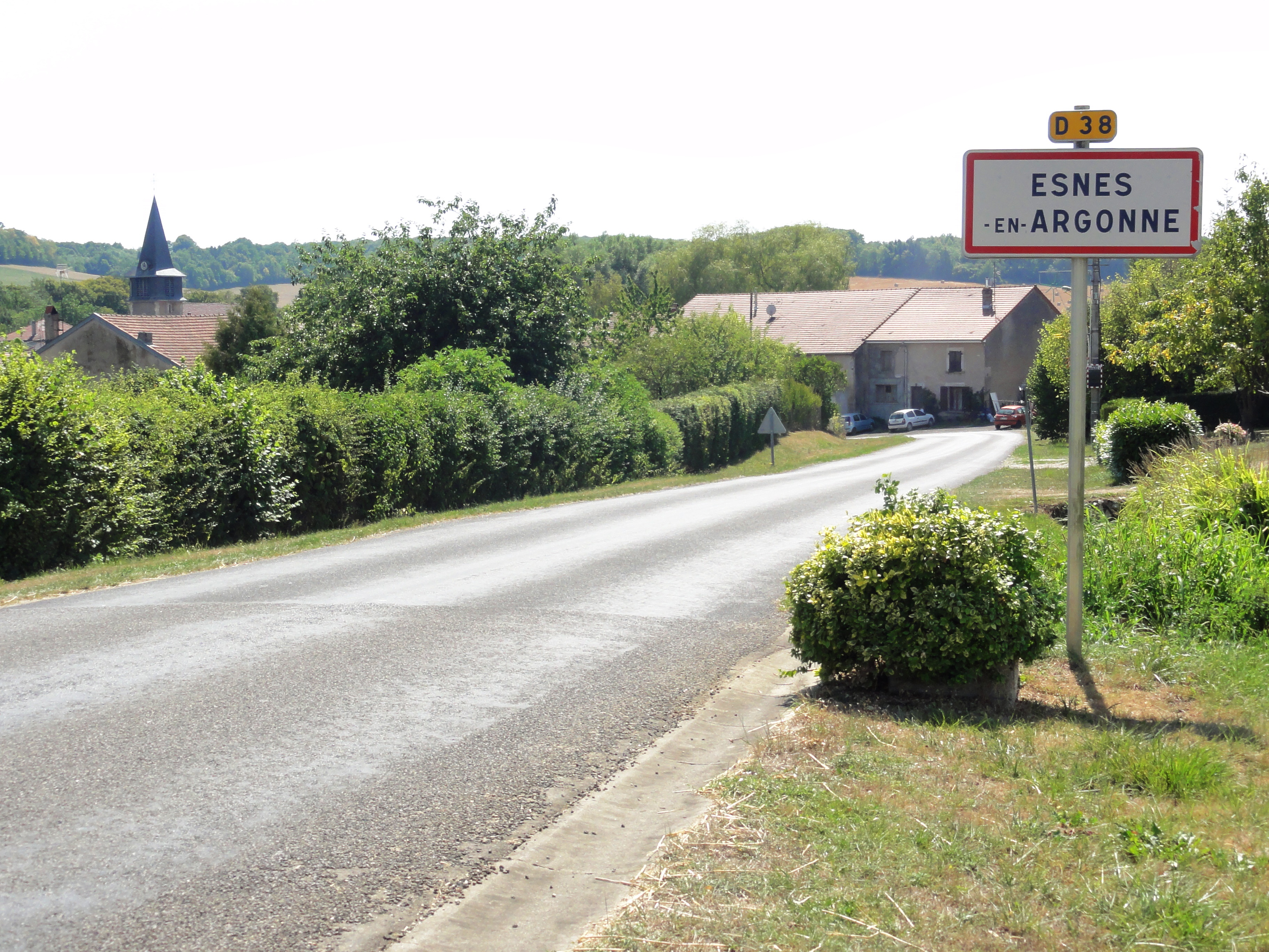 Esnes-en-Argonne (Meuse) city limit sign